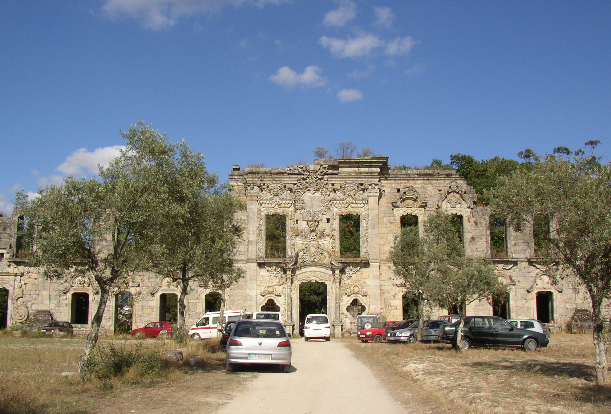 Casa inacabada de Vila Boa de Quires ou Obras do Fidalgo ou Casa das Obras This file was uploaded for Wiki Loves Monuments in Portugal with the unique identifier 74097.